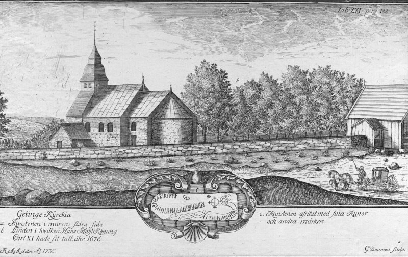 Kyrkan från sydöst. Teckning. Kategori: (01) Exteriörer Kyrkan från sydöst. Teckning.